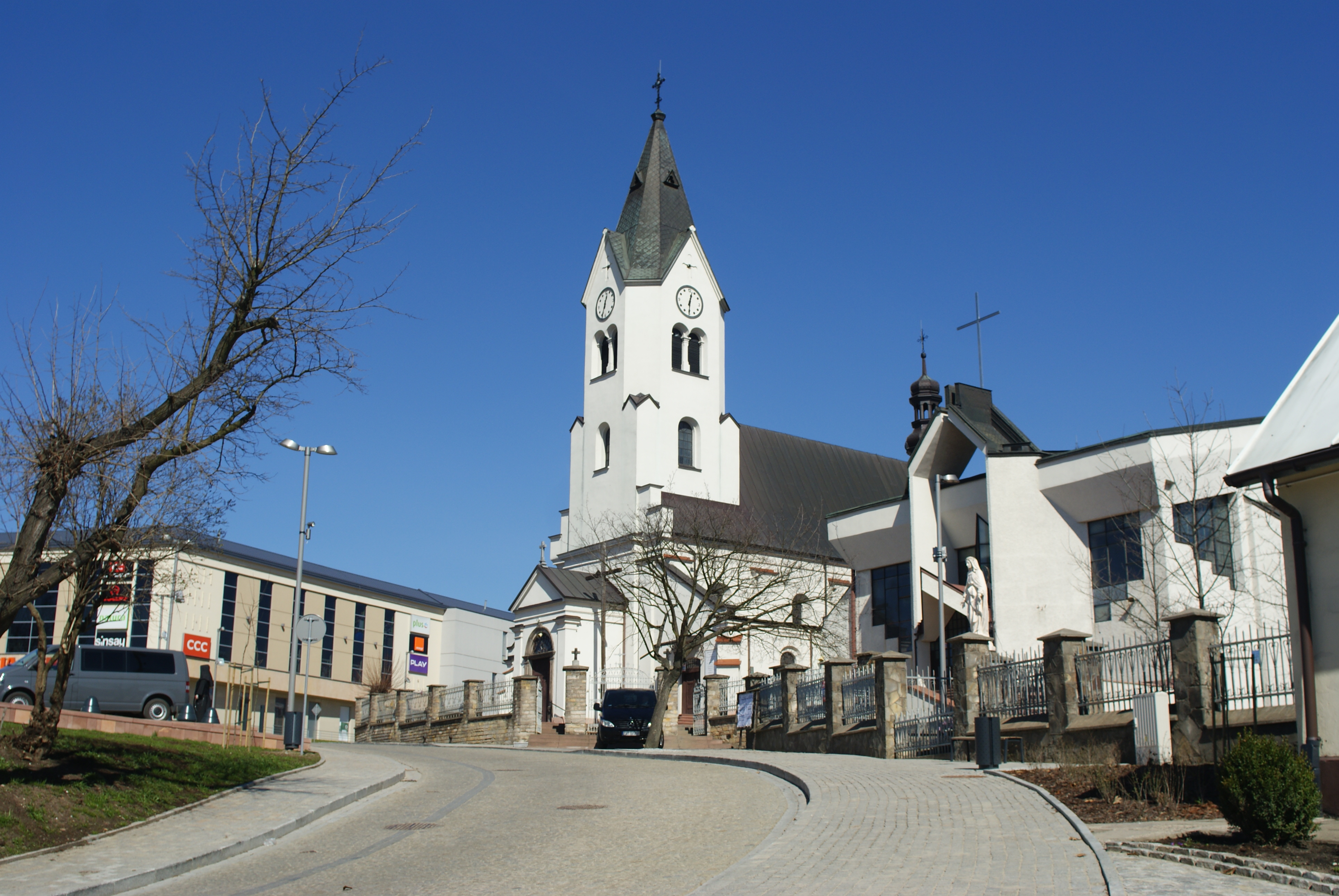 Ulica Kościelna, widok na kościół Św. Trójcy